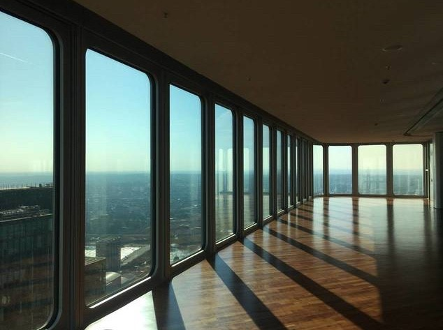 Blick aus dem Silberturm 31 Stock